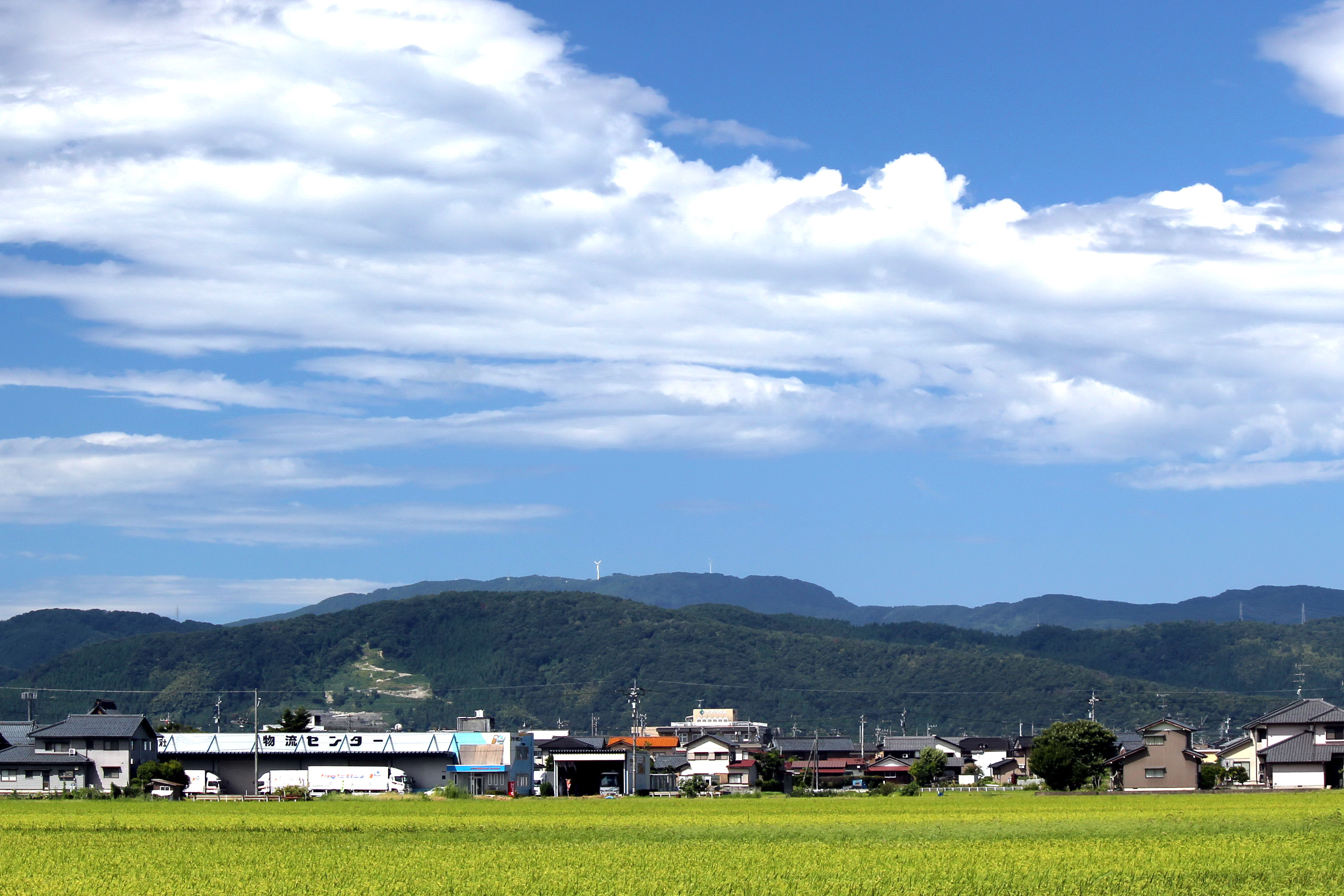 福井平野より見える国見岳